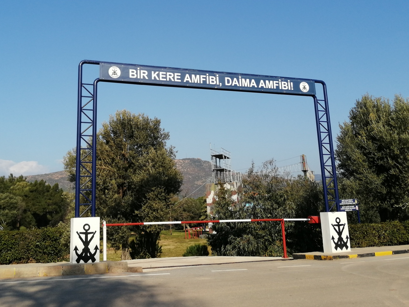 Türk deniz piyadelerinin mottolarından biri olan "Bir kere amfibi, daima amfibi" Amfibi Deniz Piyade Tugayı'ndaki eğitim parkurlarından birinin girişinde yazıyor